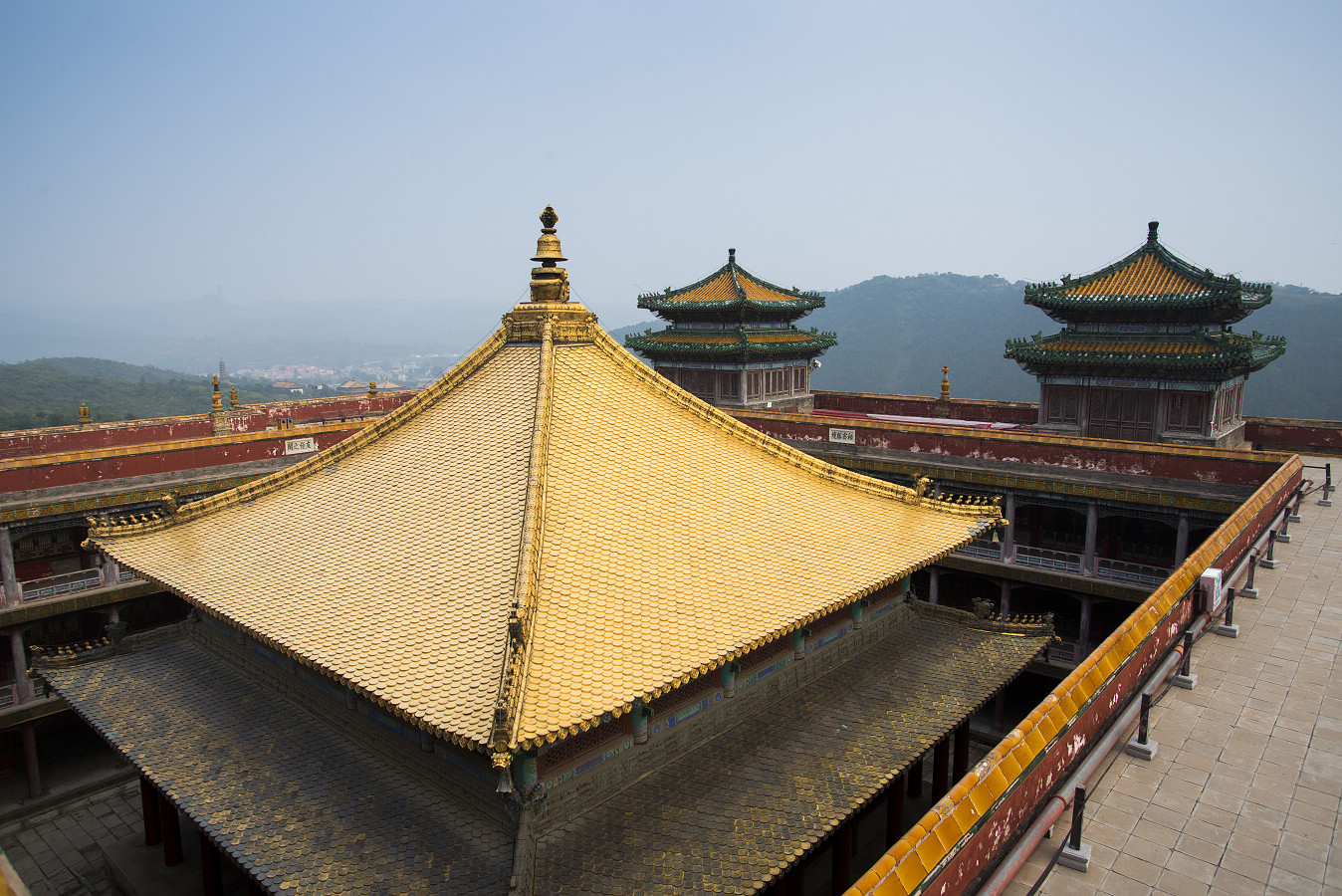 中文（中国大陆）: 半隐在大红台间的主殿，乾隆题名“万法归一”，意为佛法万种，终归于此